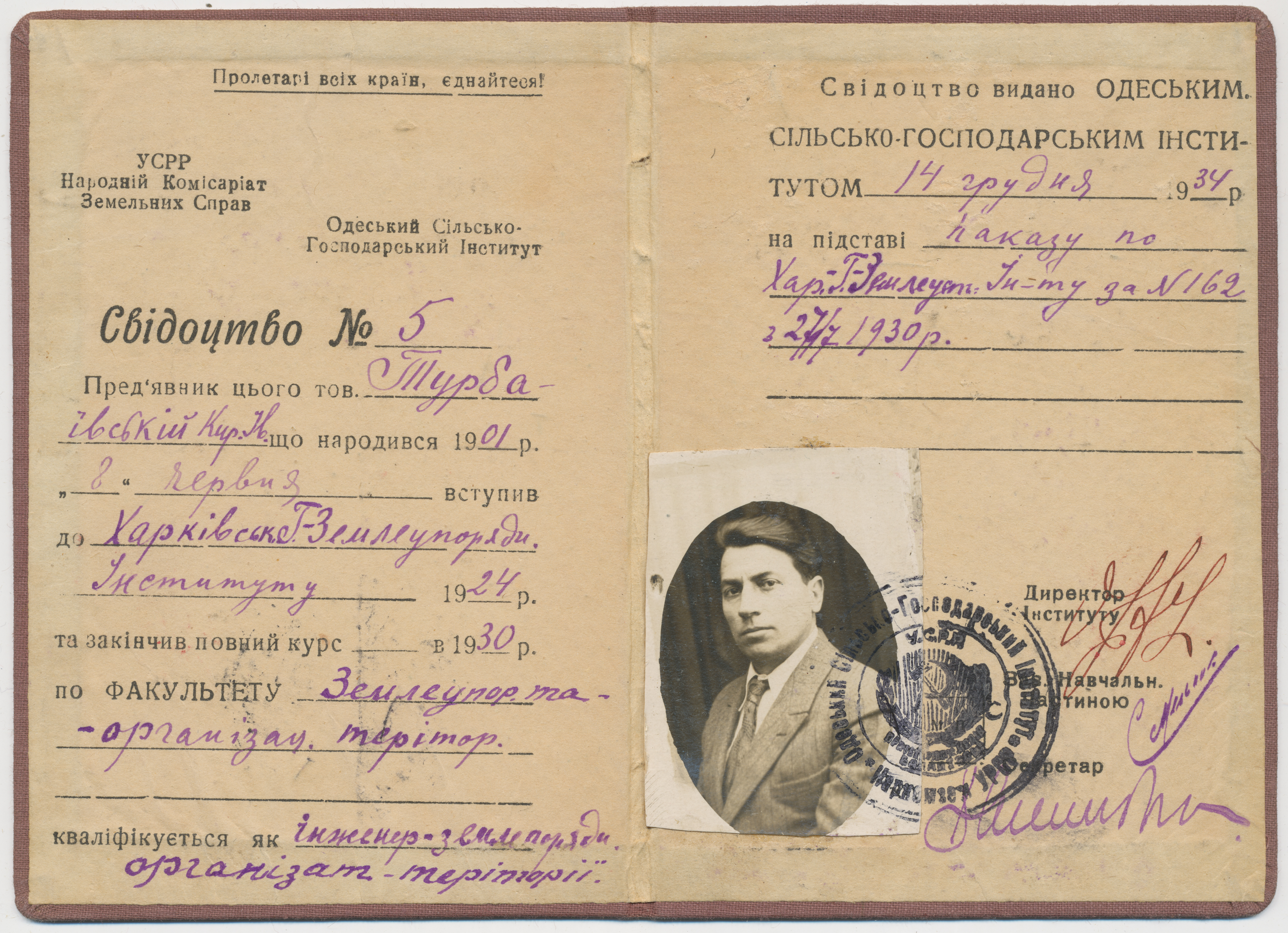 Турбаевский Кирилл Иванович (1901—1975). Дипломное свидетельство № 5 выдано в 1934 г. Одесским сельскохозяйственным институтом на основании приказа от 1930 г. по Харьковскому геодезическому и землеустроительному институту (ХГЗИ). Подписи: Директор института — Рекун Зав. учебной частью — проф. Мельник Сергей Алексеевич (1898—1968) Секретарь — Молчанов